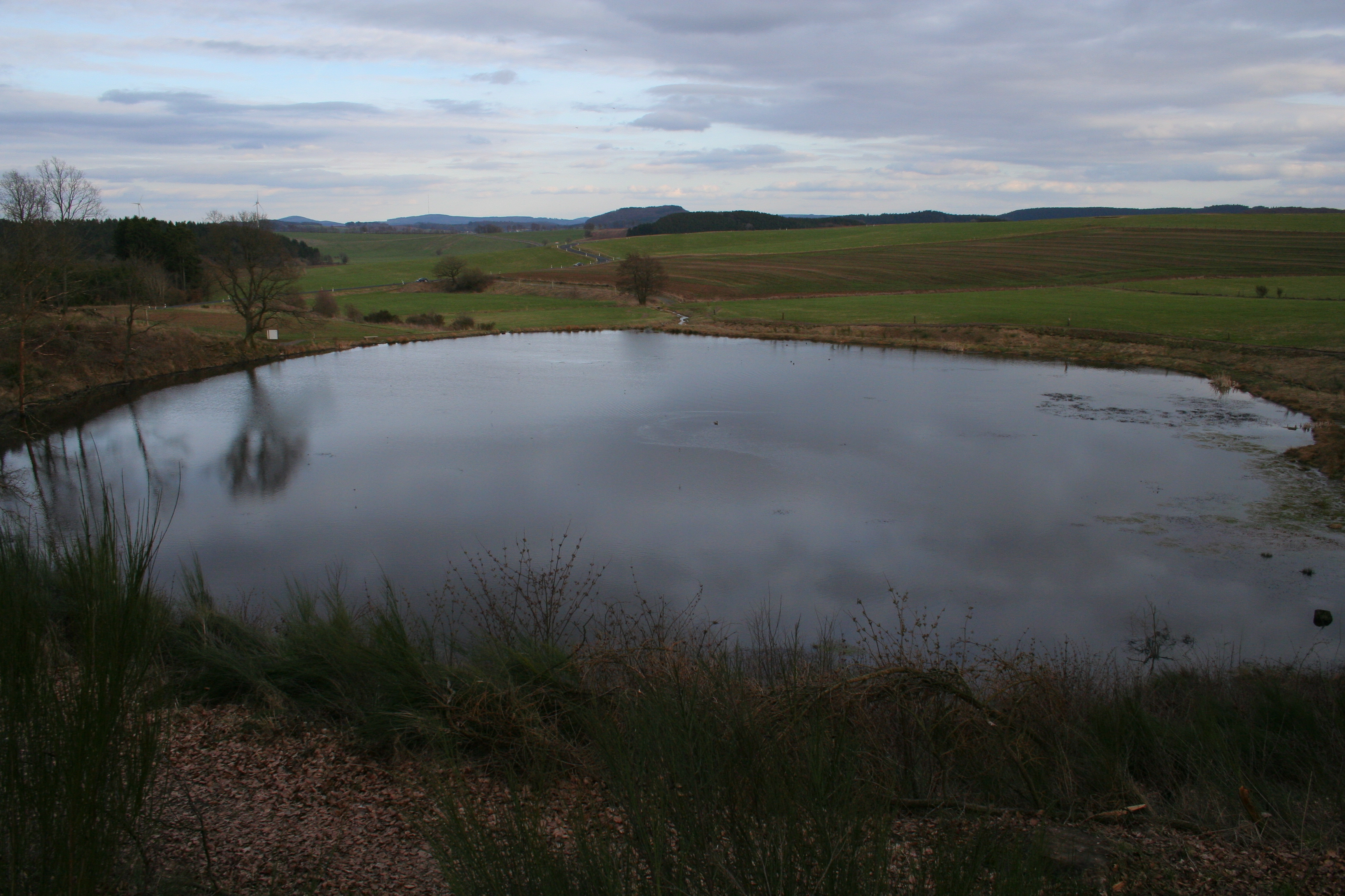 Eichholzmaar in der Vulkaneifel. Der See.